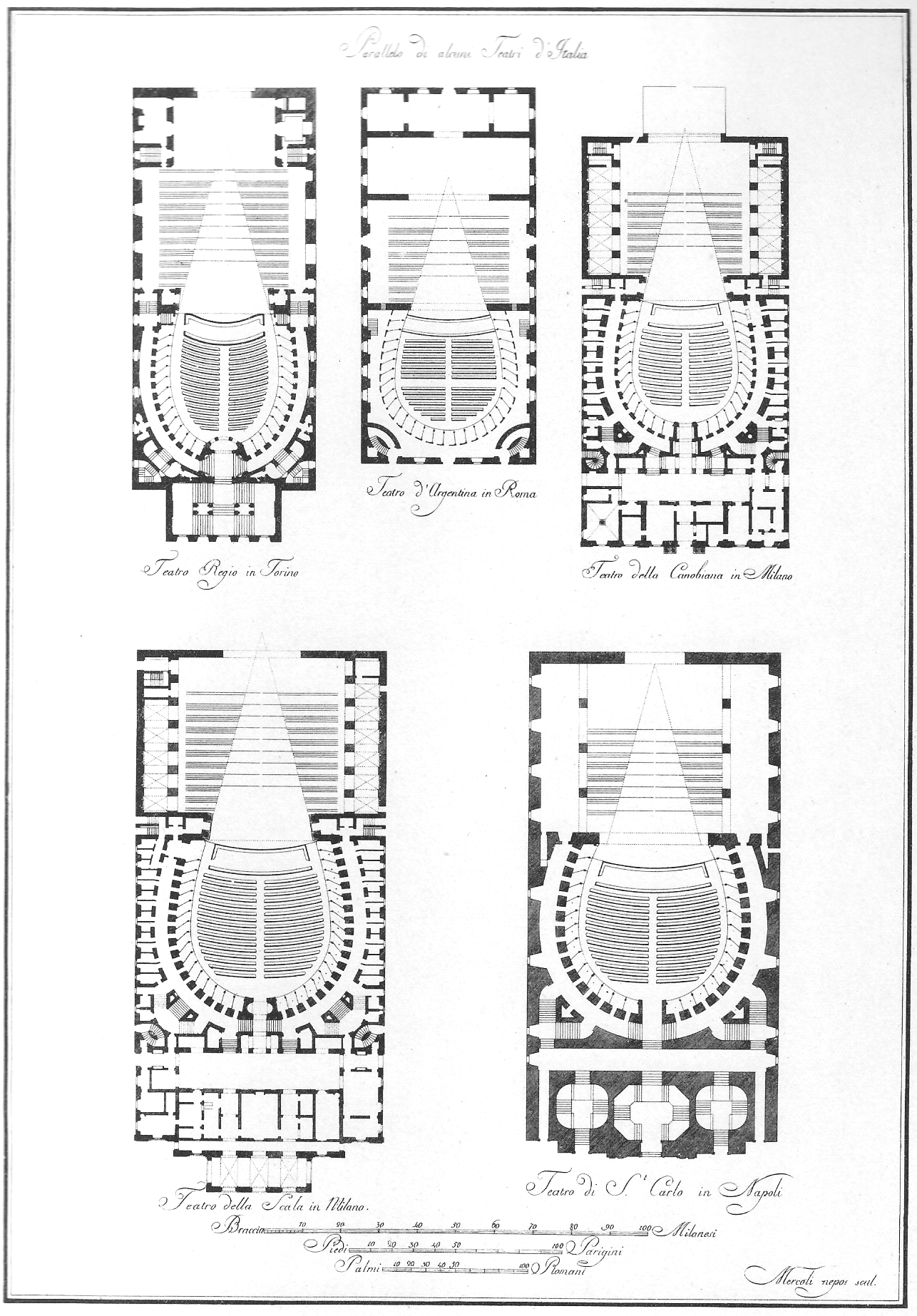 Pianta di alcuni teatri d'Italia